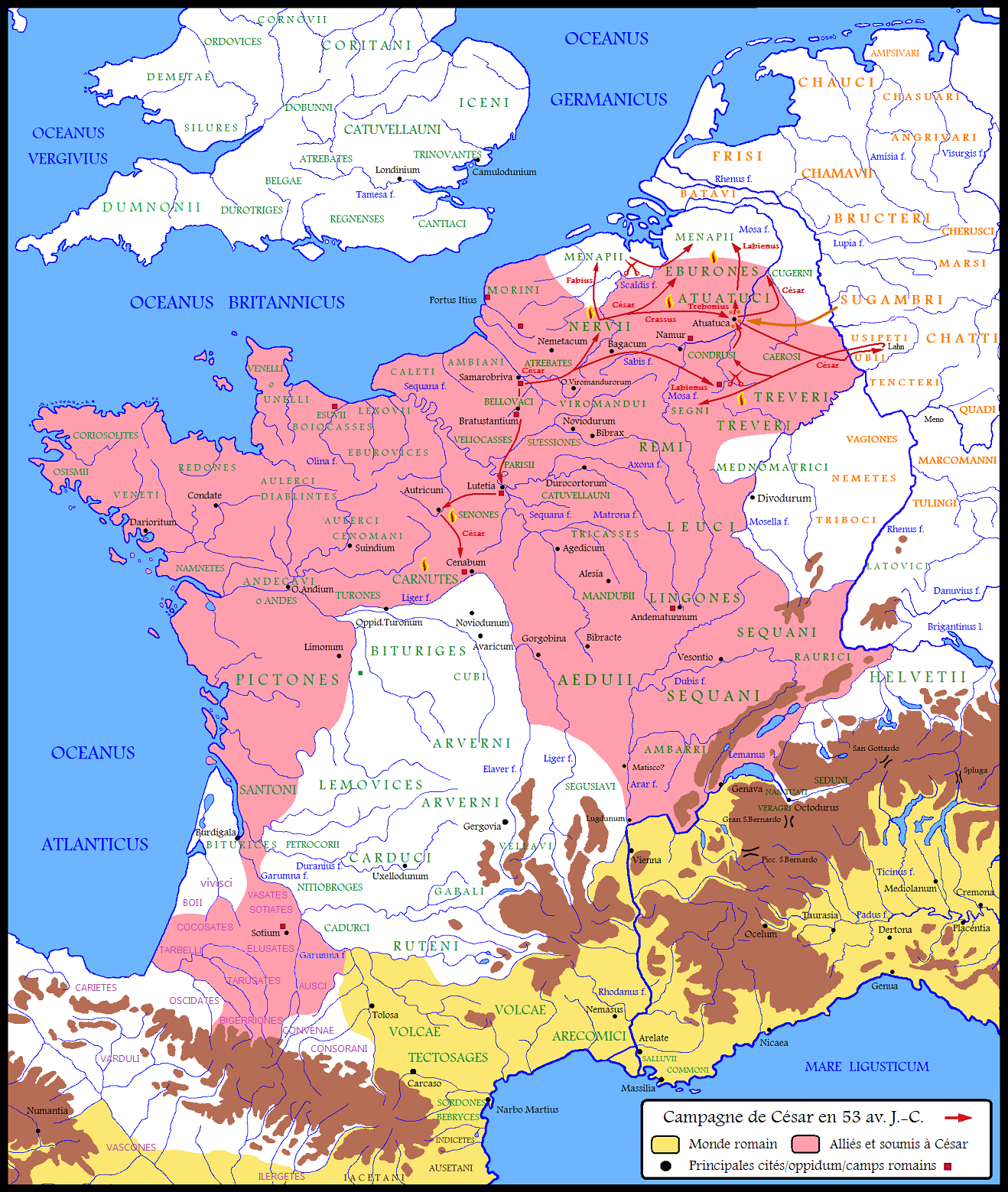 La Gaule en 53 av. J.-C. / Sixième année de campagne de César